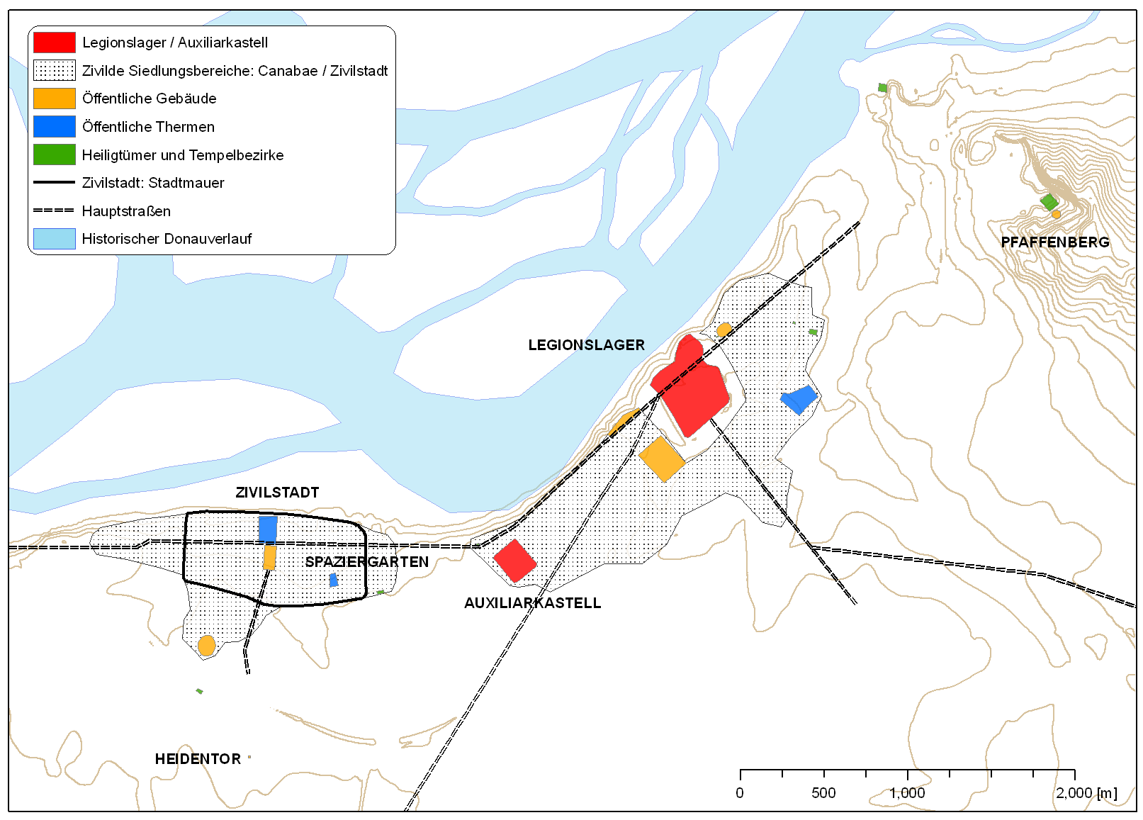 Carnuntum